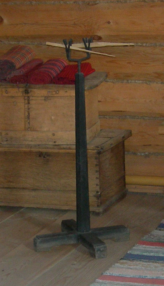 Светец - приспособление для крепления горящей лучины. Снимок сделан в доме-музее А. С. Пушкина, село Болдино, в 2007 году.